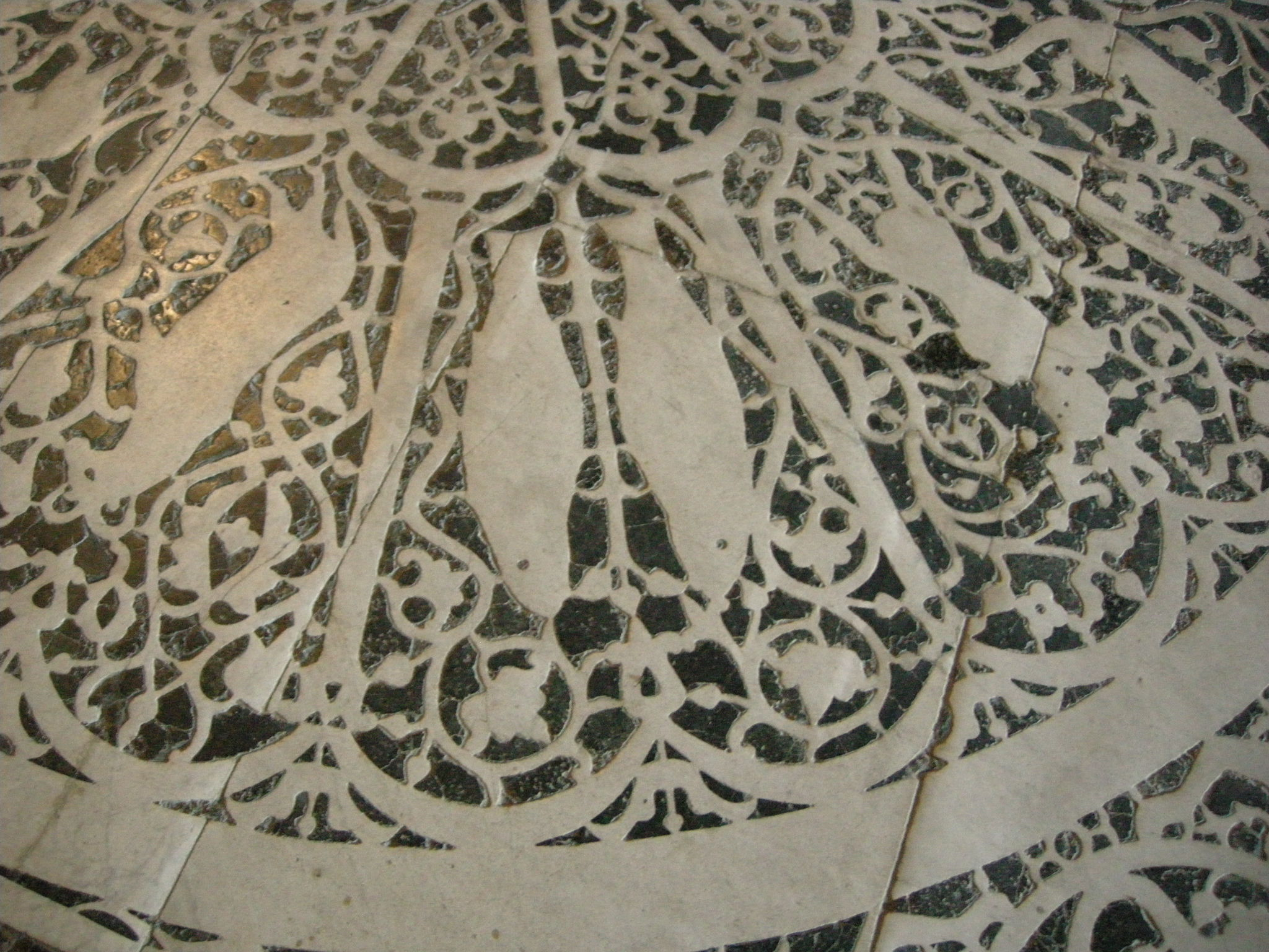 San miniato, intarsio dei 12 segni zodiacali